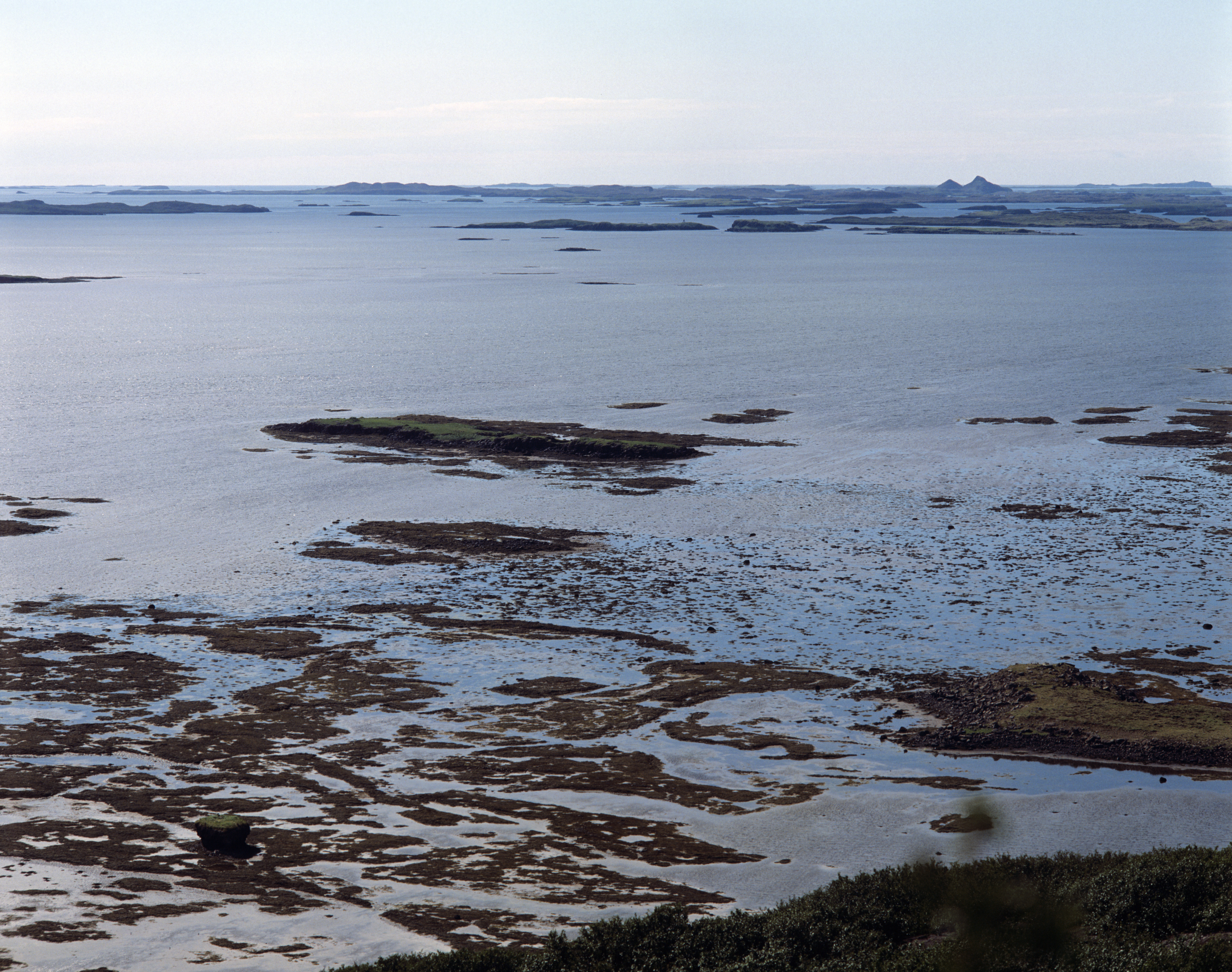 Hvammsfjörður. Von Fellströnd Richtung Brokey.